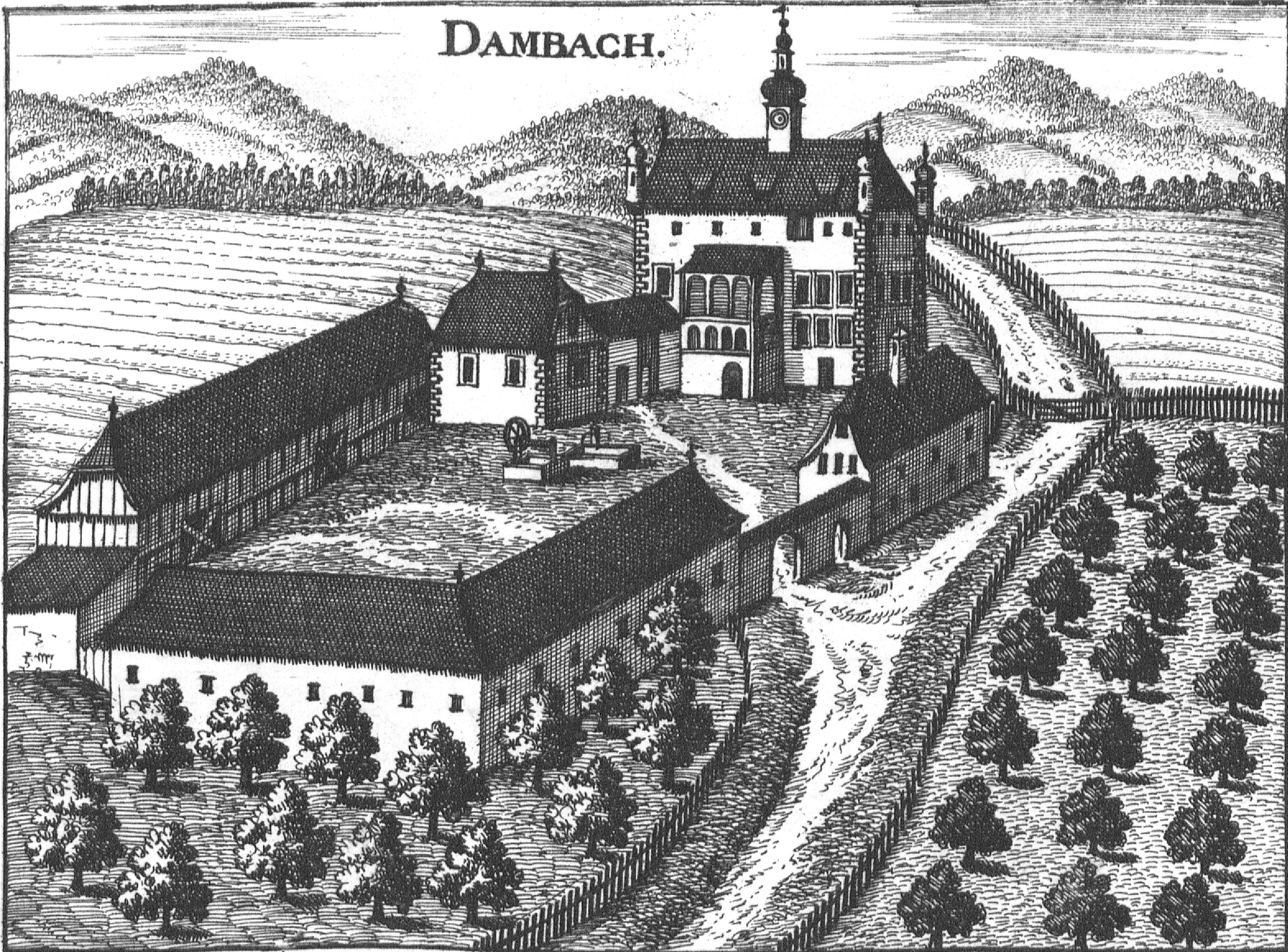 Dambach (Neuhofen an der Krems) nach Vischer